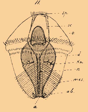 Иллюстрация к статье Эхиуровые из энциклопедии Брокгауза и Ефрона